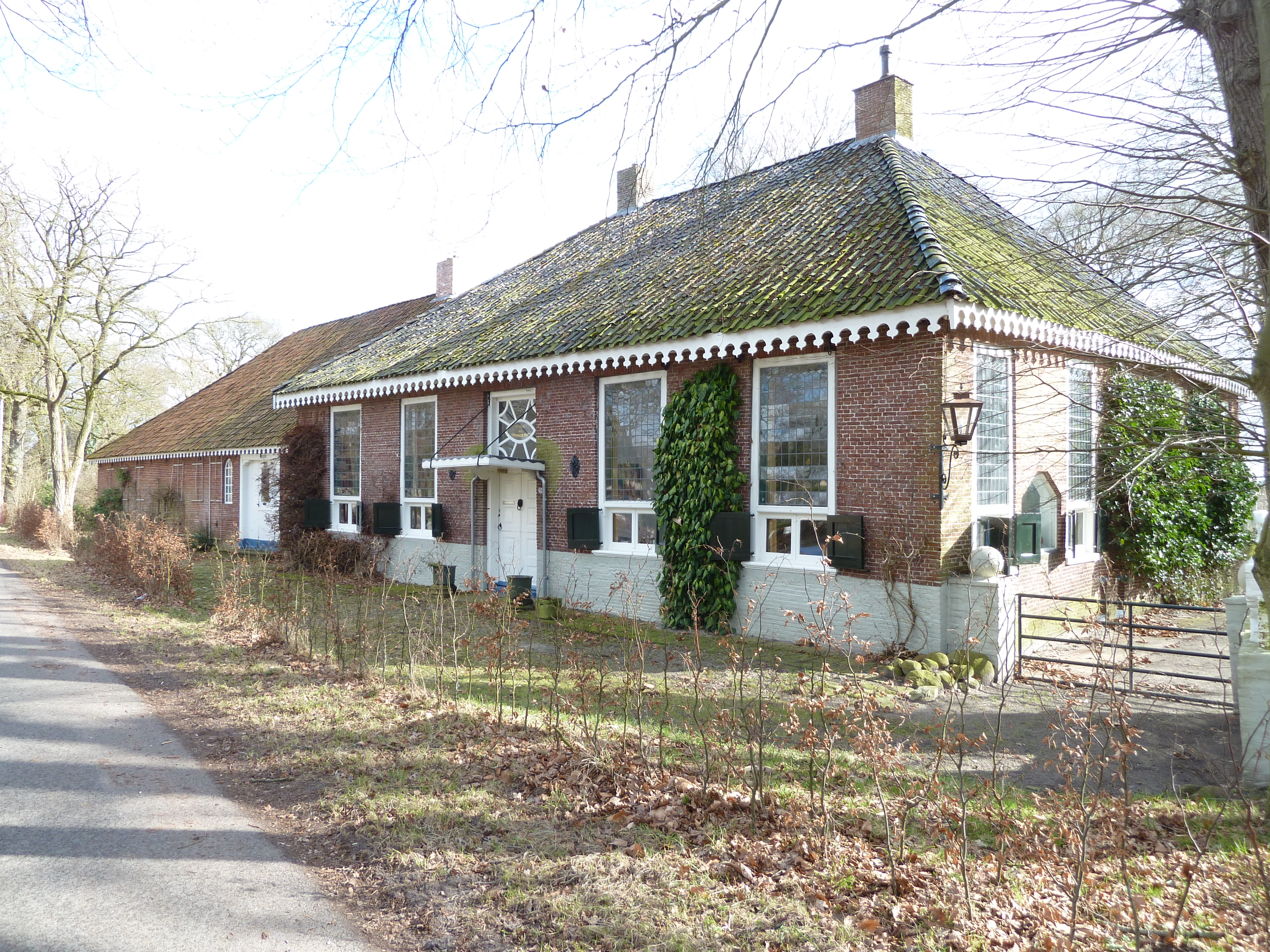 Het voormalige veerhuis Groninger Punt aan Groninger zijde van de Drentsche Aa.